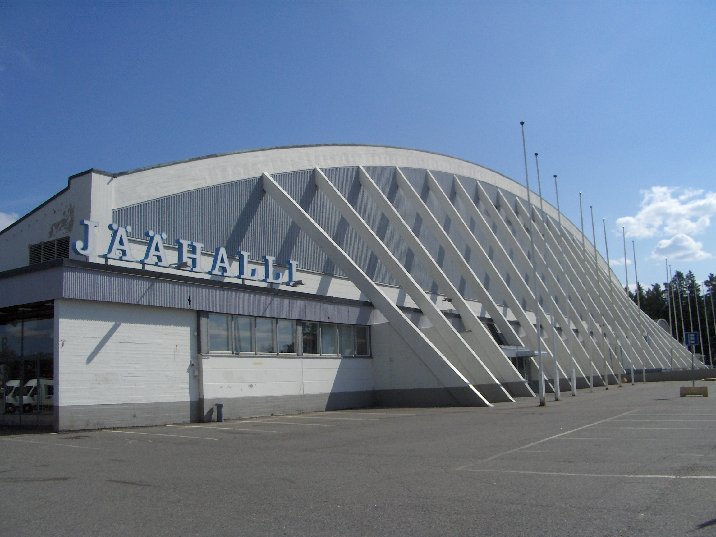 Tampere ice stadium